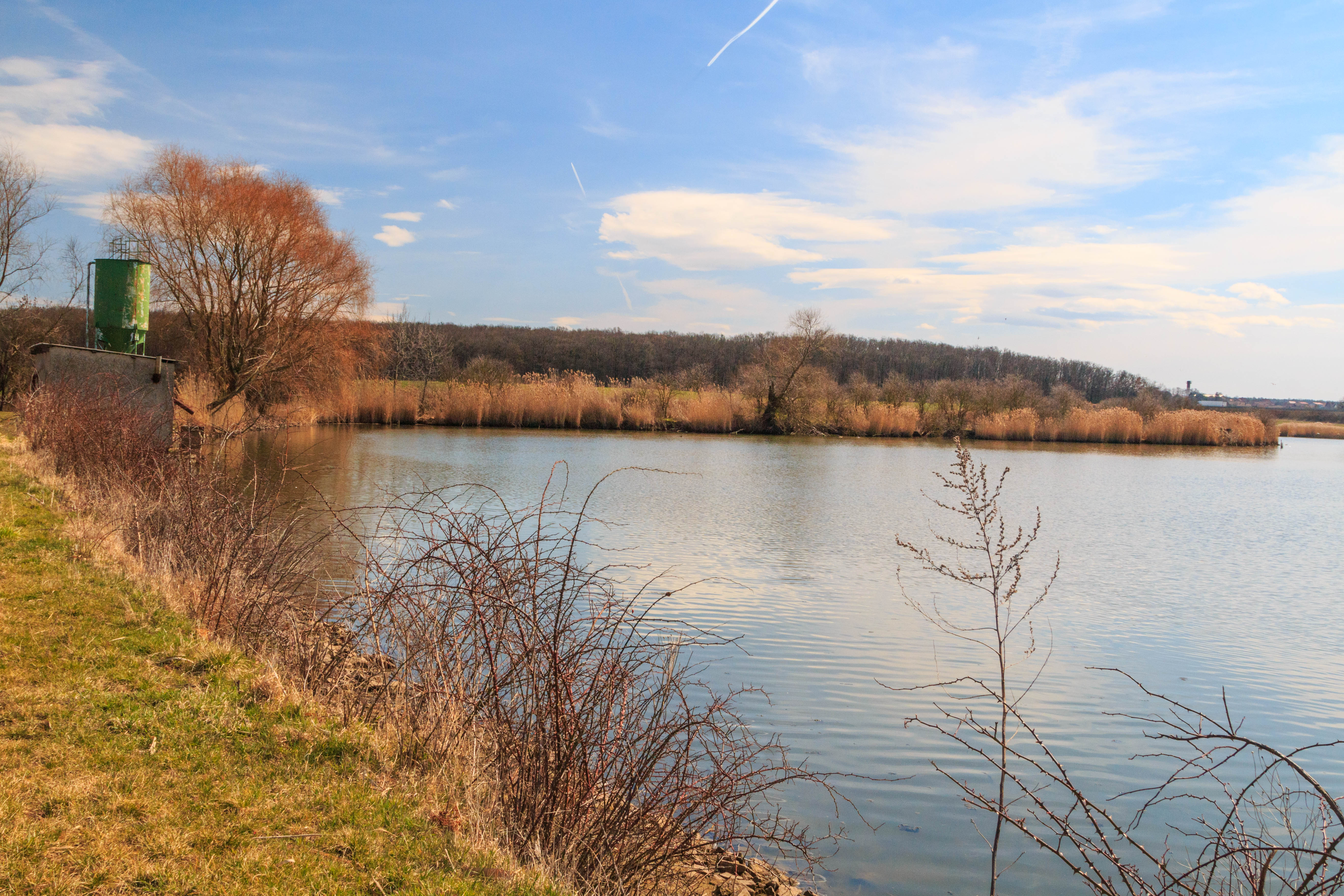 Kněžský rybník u obce Stará Voda Project: Vodstvo.